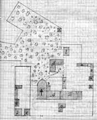 План жаночага Праабражэнскага манастыра. 1910—1918 гг. НГАБ. А, Б, Д — манастырскія келлі. В — пакоі ігуменні. Г — школа. Ж, З — гатэль, крамы, майстэрні. И, К, Л — жылыя кватэры. М, Н, О, П, Р — гаспадарчыя будынкі. 7, 8, 9. Касцёл, перабудаваны пад клуб. 1950-я гг. Нацыянальны музей гісторыі і культуры Беларусі.